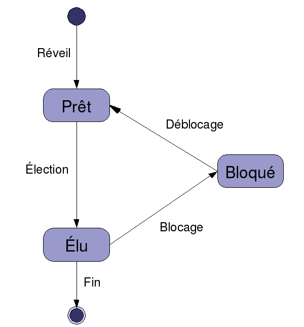 créée par moi même sur OpenOffice.